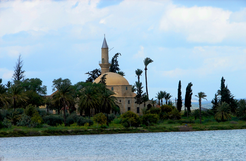 a@a hala sultan mosque (tekke) larnaca cy